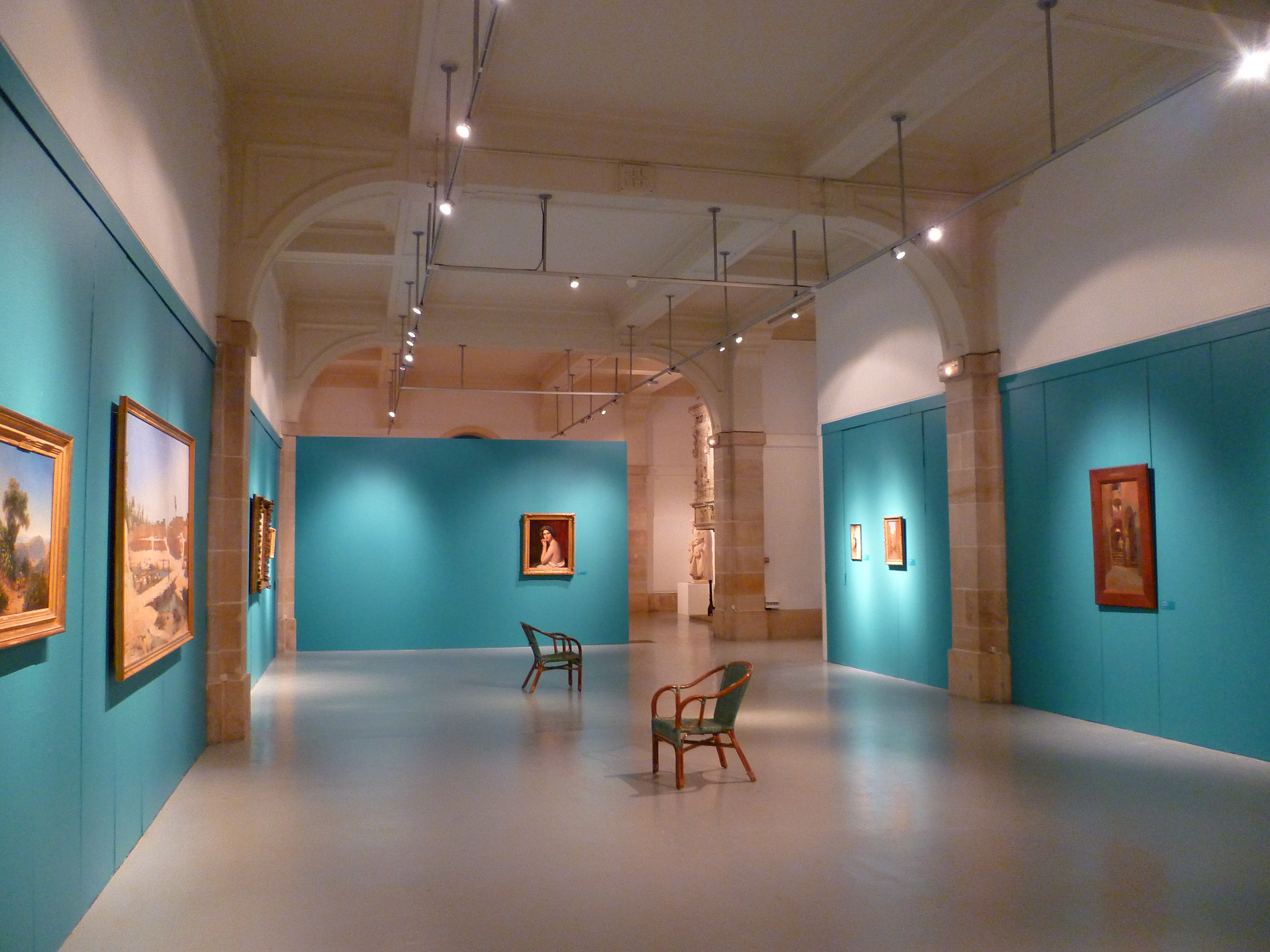 Une salle du Musée Saint-Loup de Troyes (Aube, France).